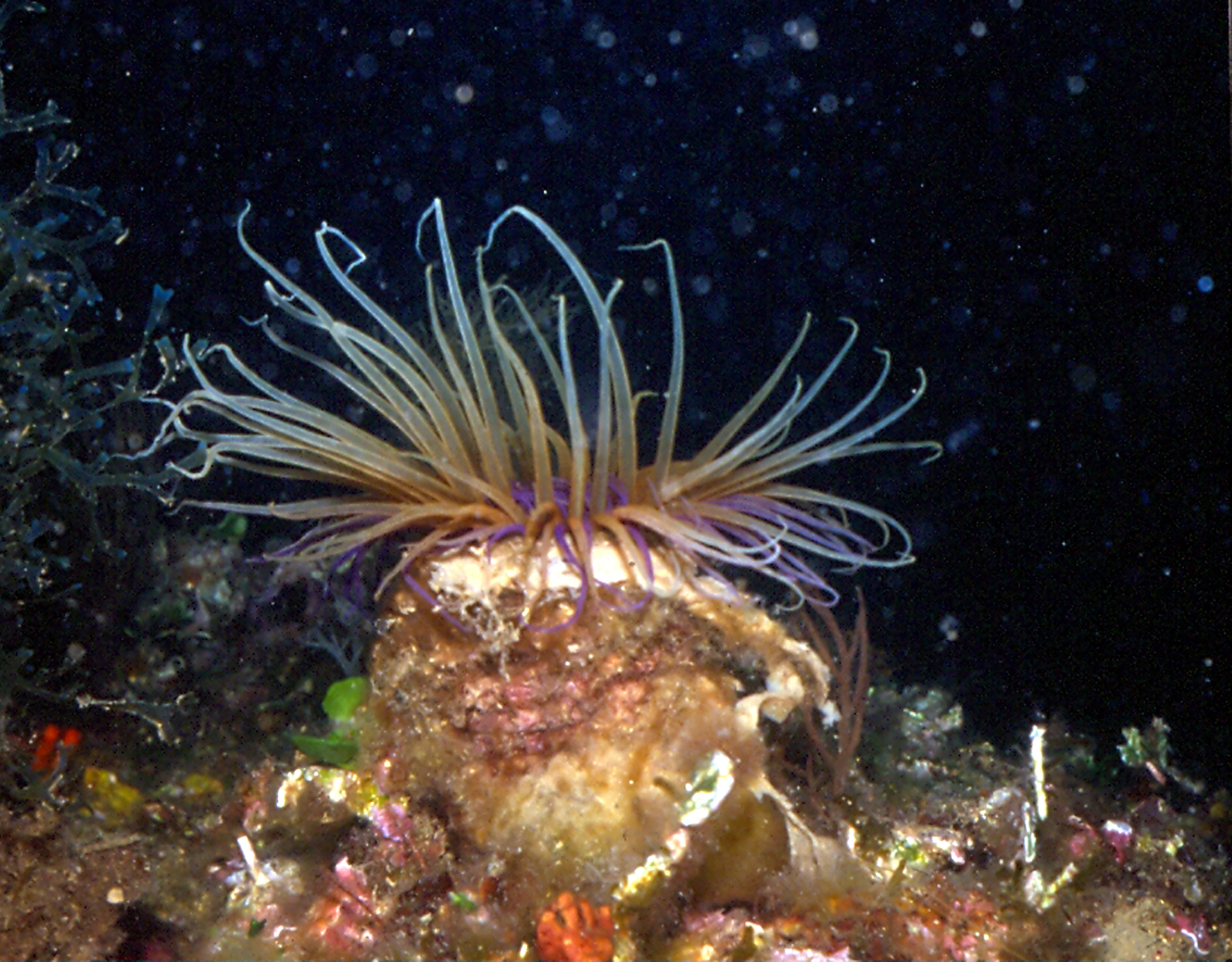 Cerianthus membranaceus Spallanzani, 1784 - Banyuls-sur-Mer : 08/81